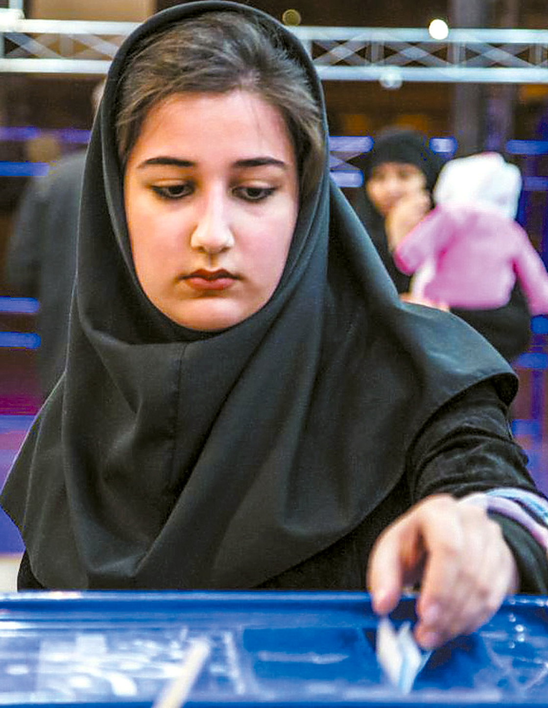 February 26 2016-Iranian legislative election-a voter casts her ballot in a box at a polling station in Nishapur